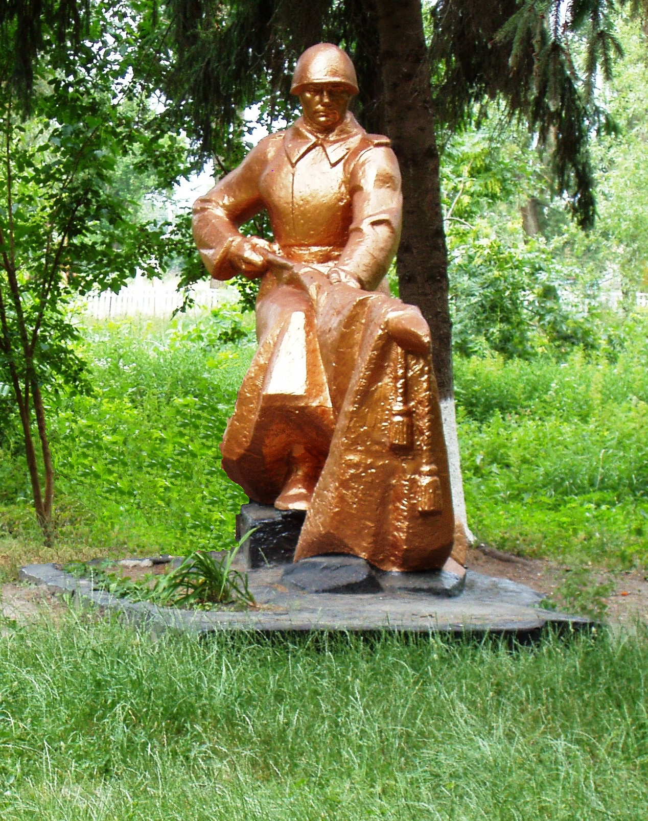 Братська могила радянських воїнів, які загинули в роки Великої Вітчизняної війни, село Глибоке Бориспільського району (Київська область, Україна), вул. Леніна (в парку)